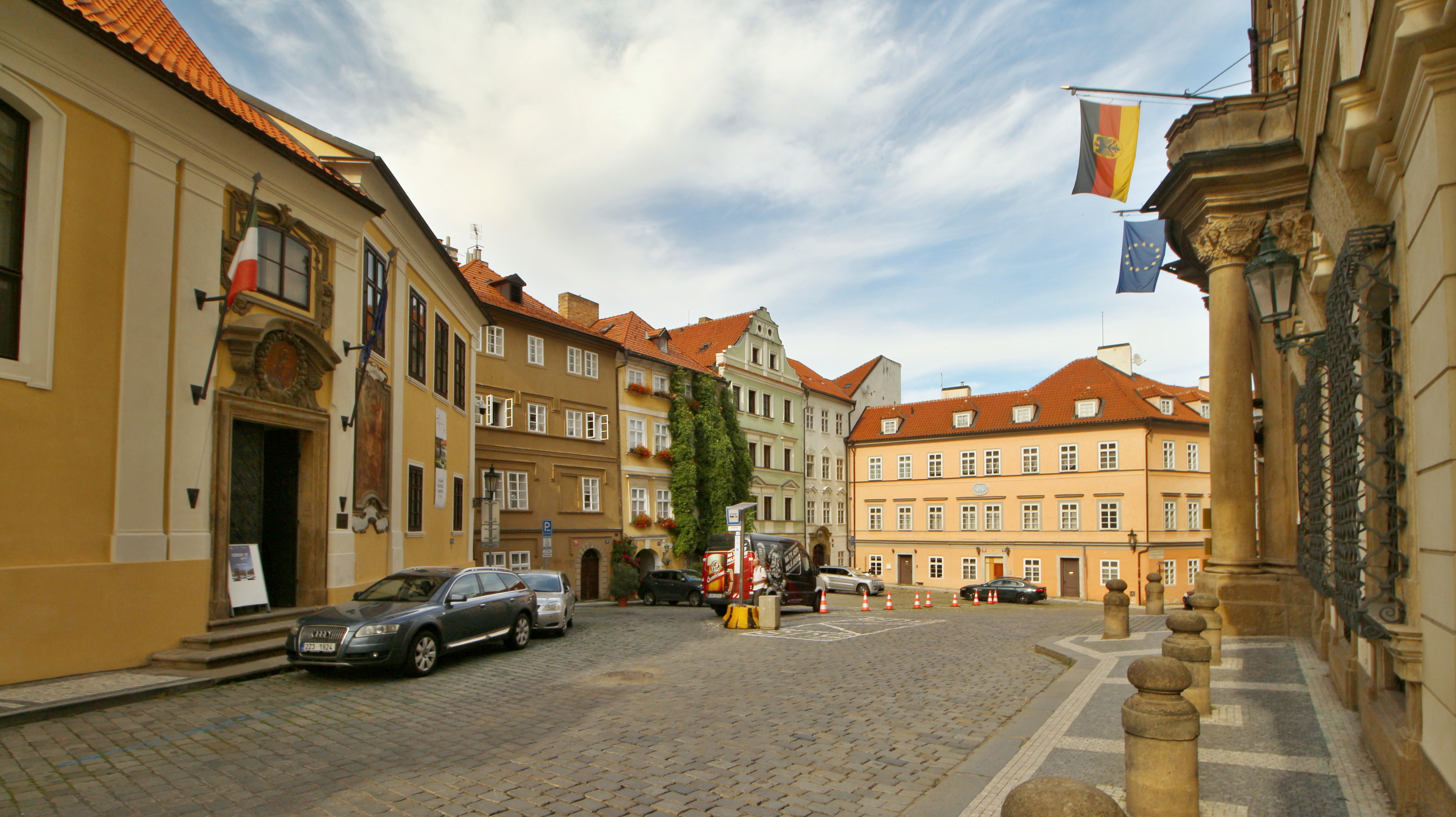 Malá Strana Vlašská ulice